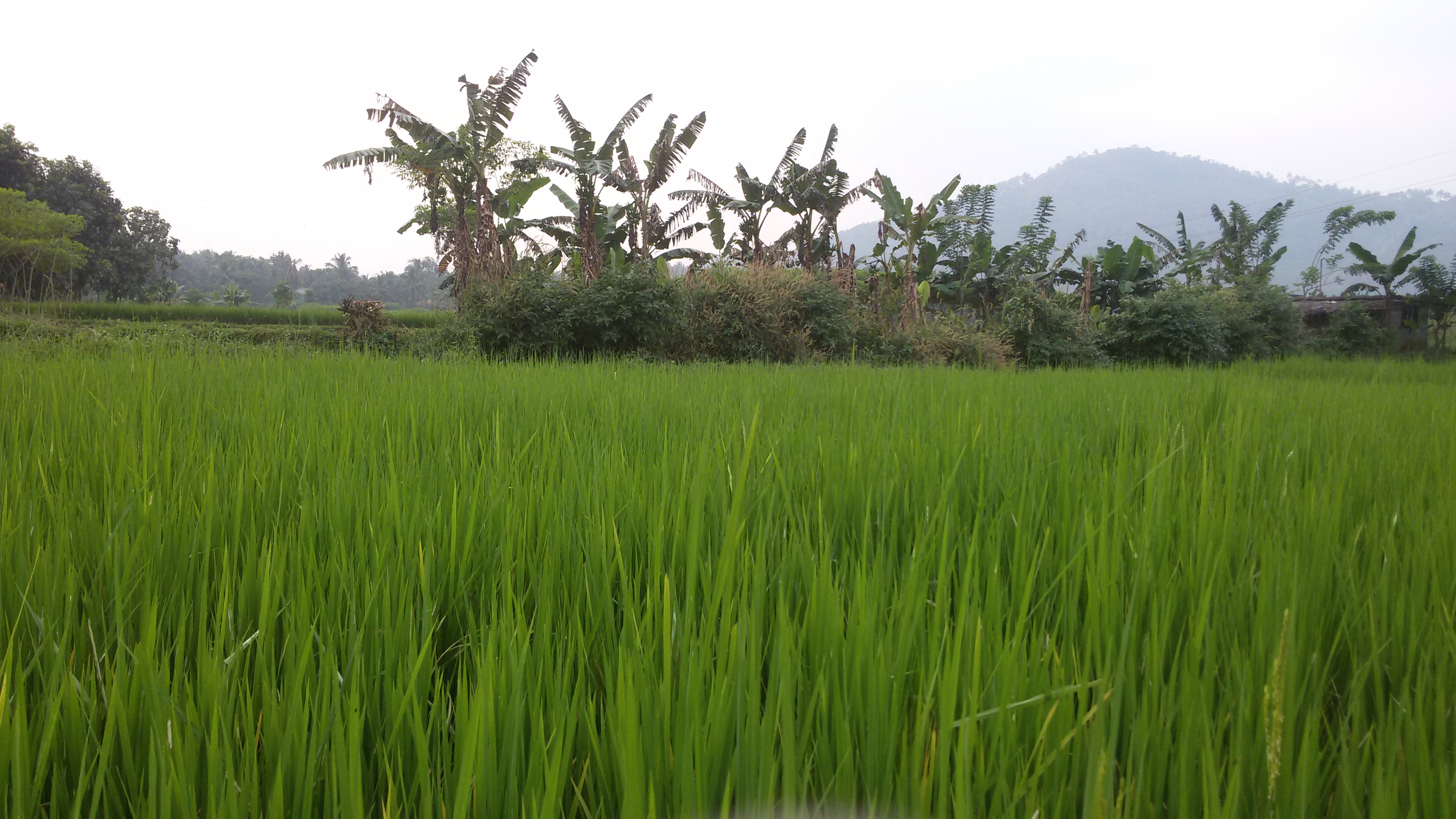 മലപ്പുറം ശാന്തപുരത്തെ ഒരു പാടശേഖരം